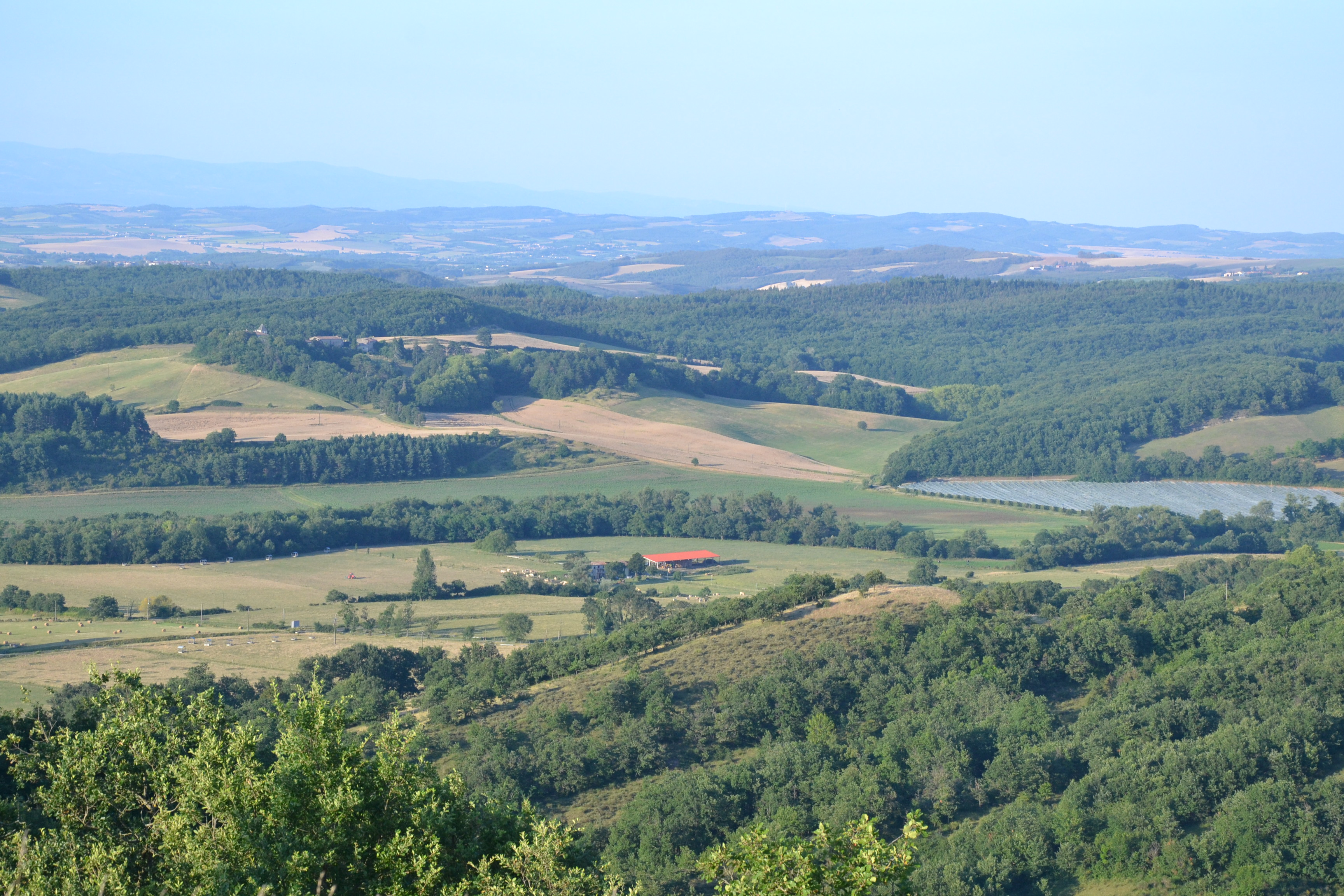 Vue sur la vallée de l'Ambronne, près de Gueytes-et-Labastide (commune de Val de Lambronne), depuis les hauteurs de Caudeval. En arrière-plan, la Montagne Noire à gauche, et la Malepère à droite.